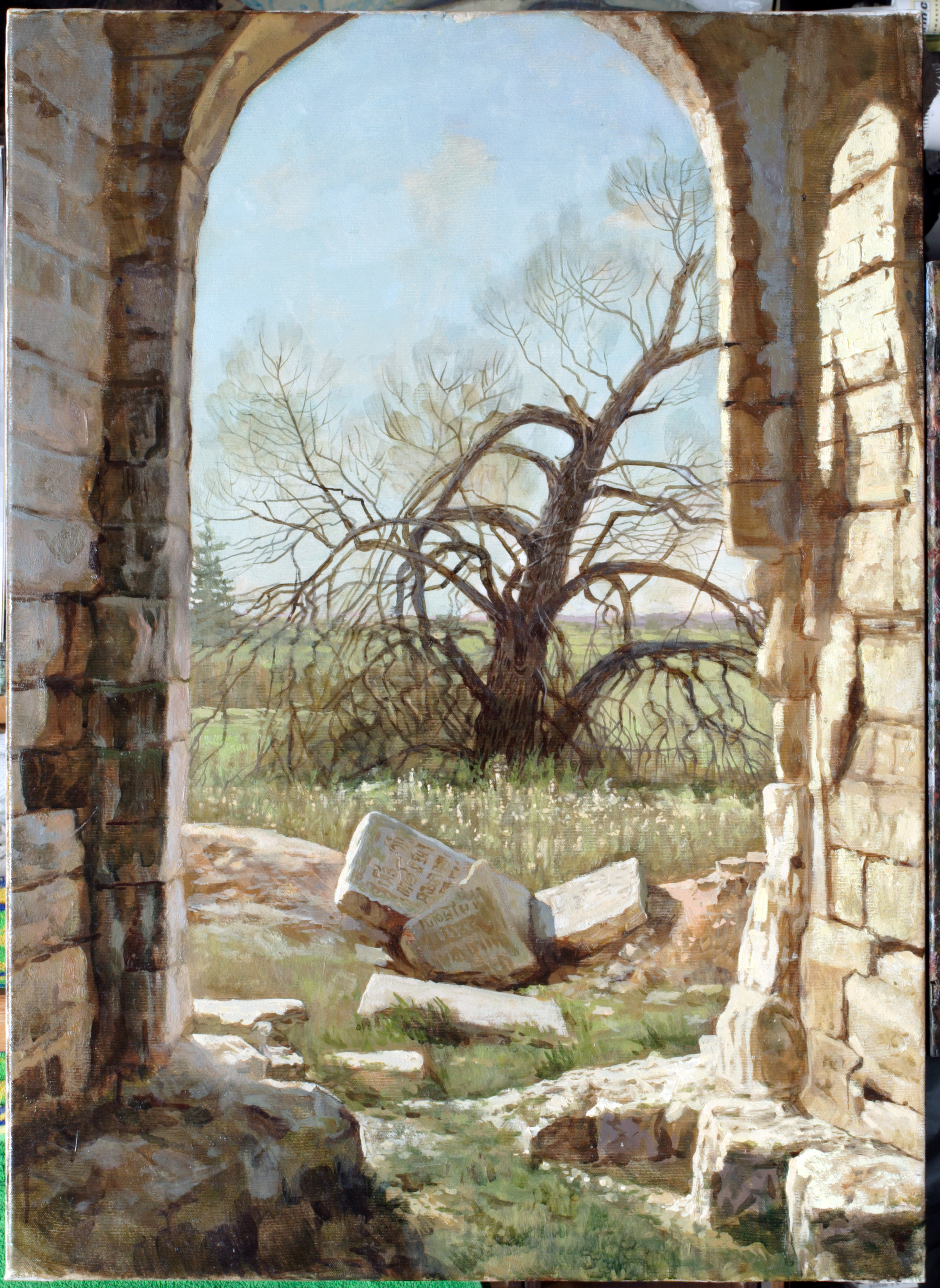 "Хронос"